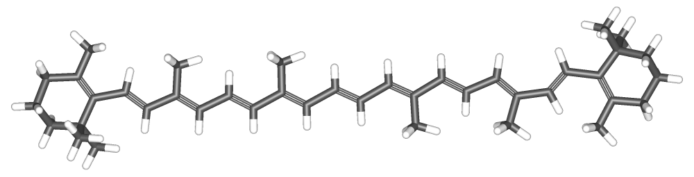 Beta-Carotene